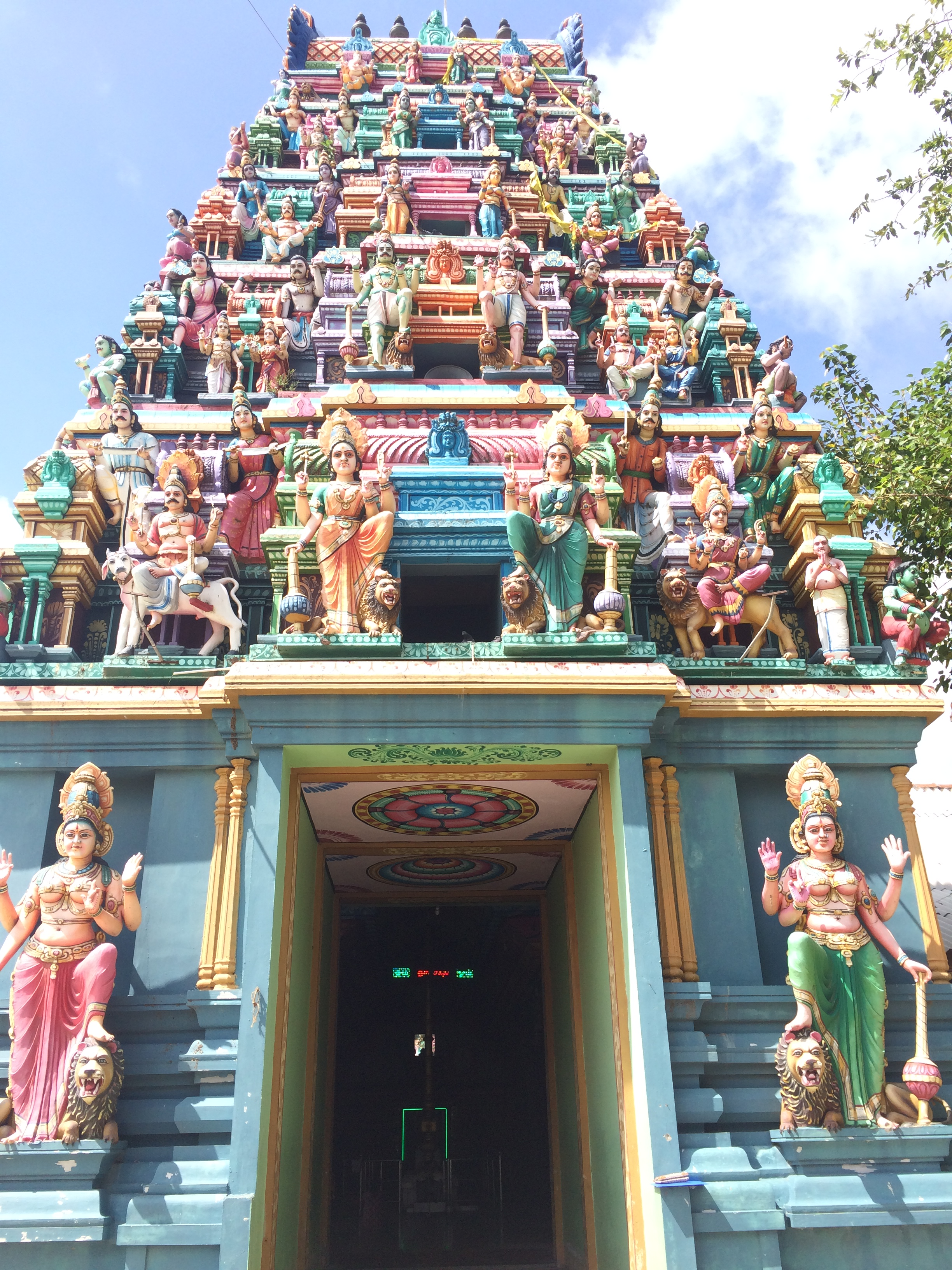 பத்திரகாளி சமேத வீரபத்திரர் ஆலயம்